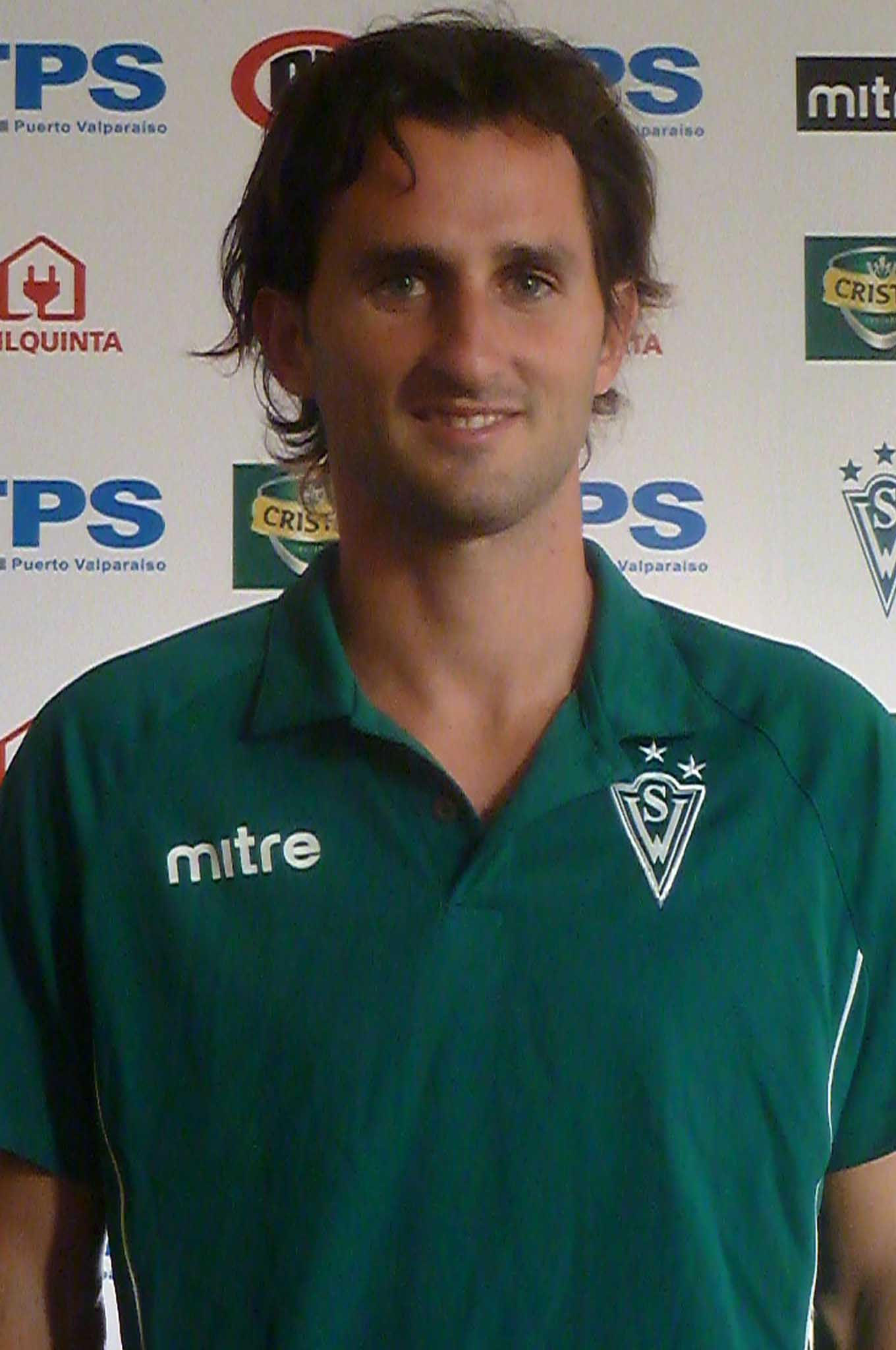 Fotografía de Pablo Calandria, jugador de fútbol argentino que juega como delantero.